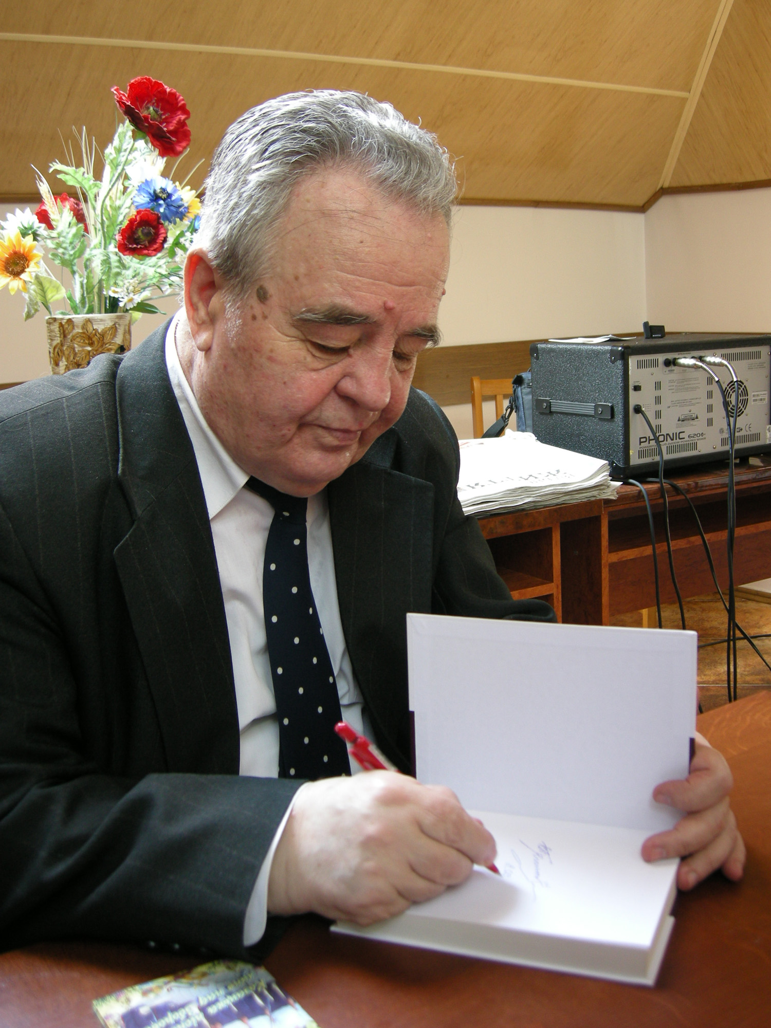 Український письменник, дослідник історії, автор бестселерів «Країна Моксель, або Московія», «Москва Ординська» та «Україна-Русь» Володимир Броніславович Білінський у редакції газети «Вільне життя плюс» (2012 р.).